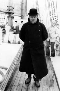 Mogens Frohn Nielsen